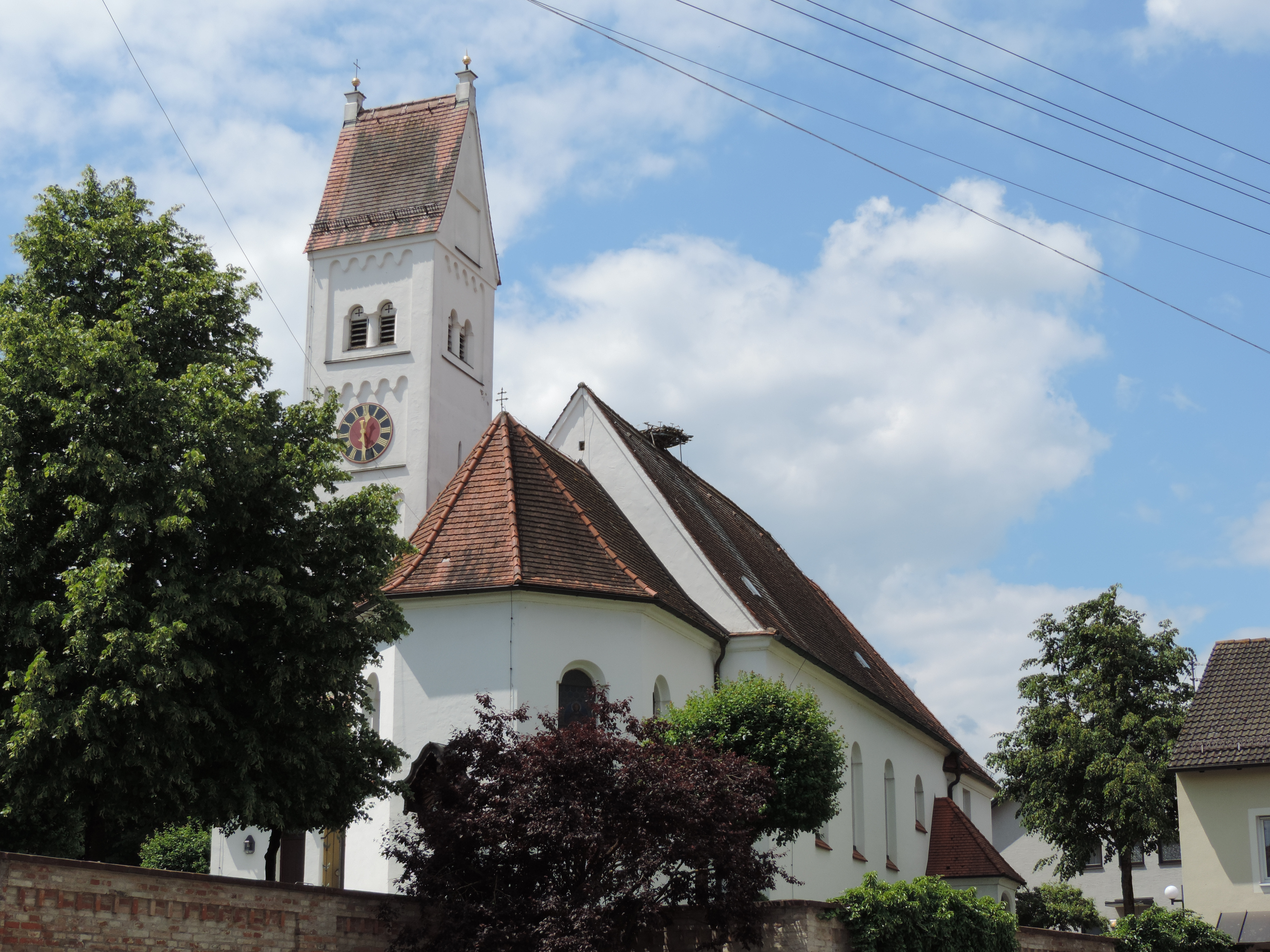 Nordwestansicht